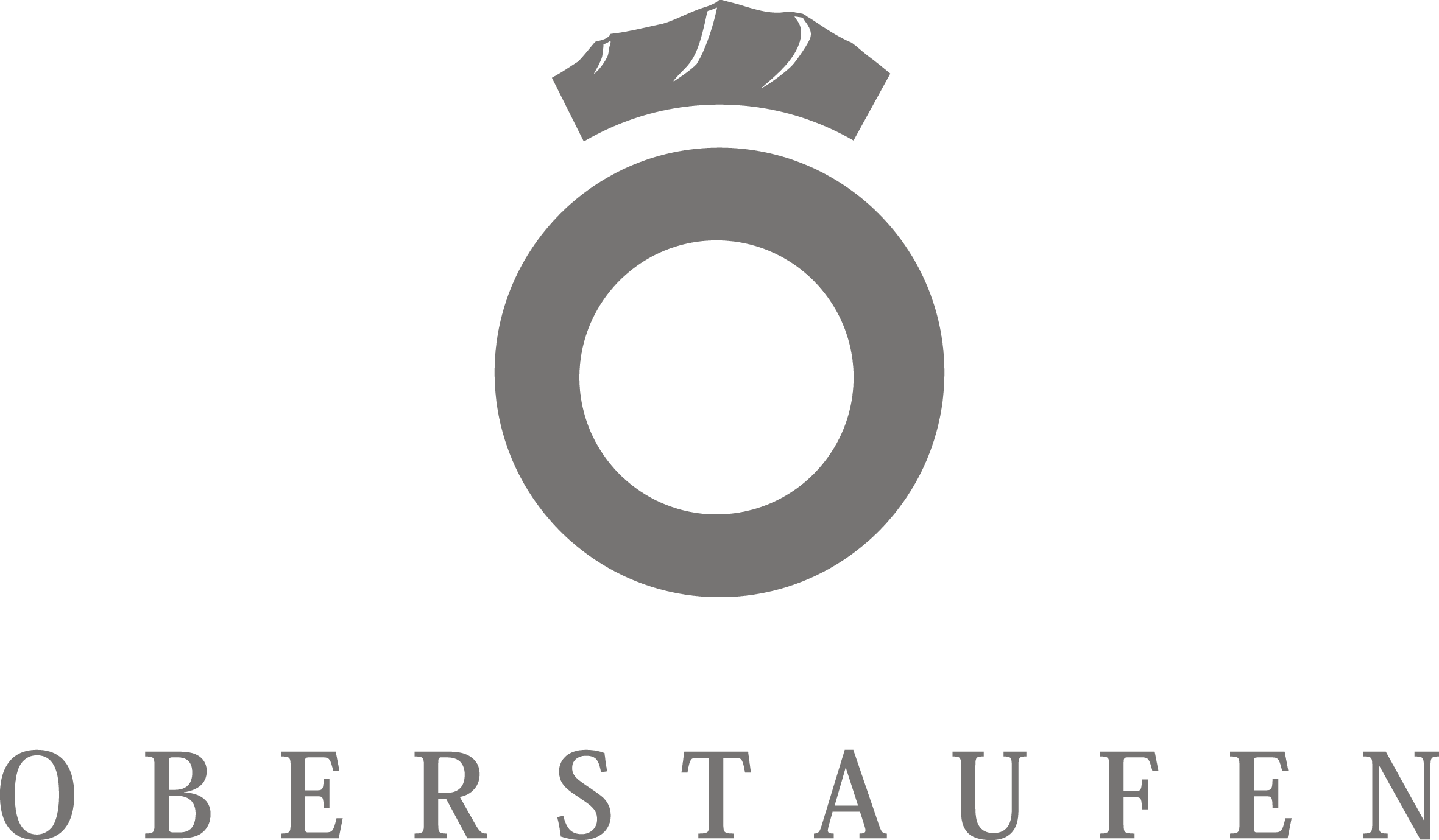 Nach mehreren Sitzungen des Marktgemeinderates wurde Anfang März 2017 die Entscheidung getroffen, einen Kreis, der in seiner Form den Gebietsgrenzen der Gemarkung Oberstaufen entspricht und gleichzeitig das Symbol für das "Einkreisen" eines wichtigen Ziels, als Grundform für das neue Logo zu nehmen. Über dem Kreis thront der Hochgrat als "Wahrzeichen" in Form einer Krone oder eines Juwels.